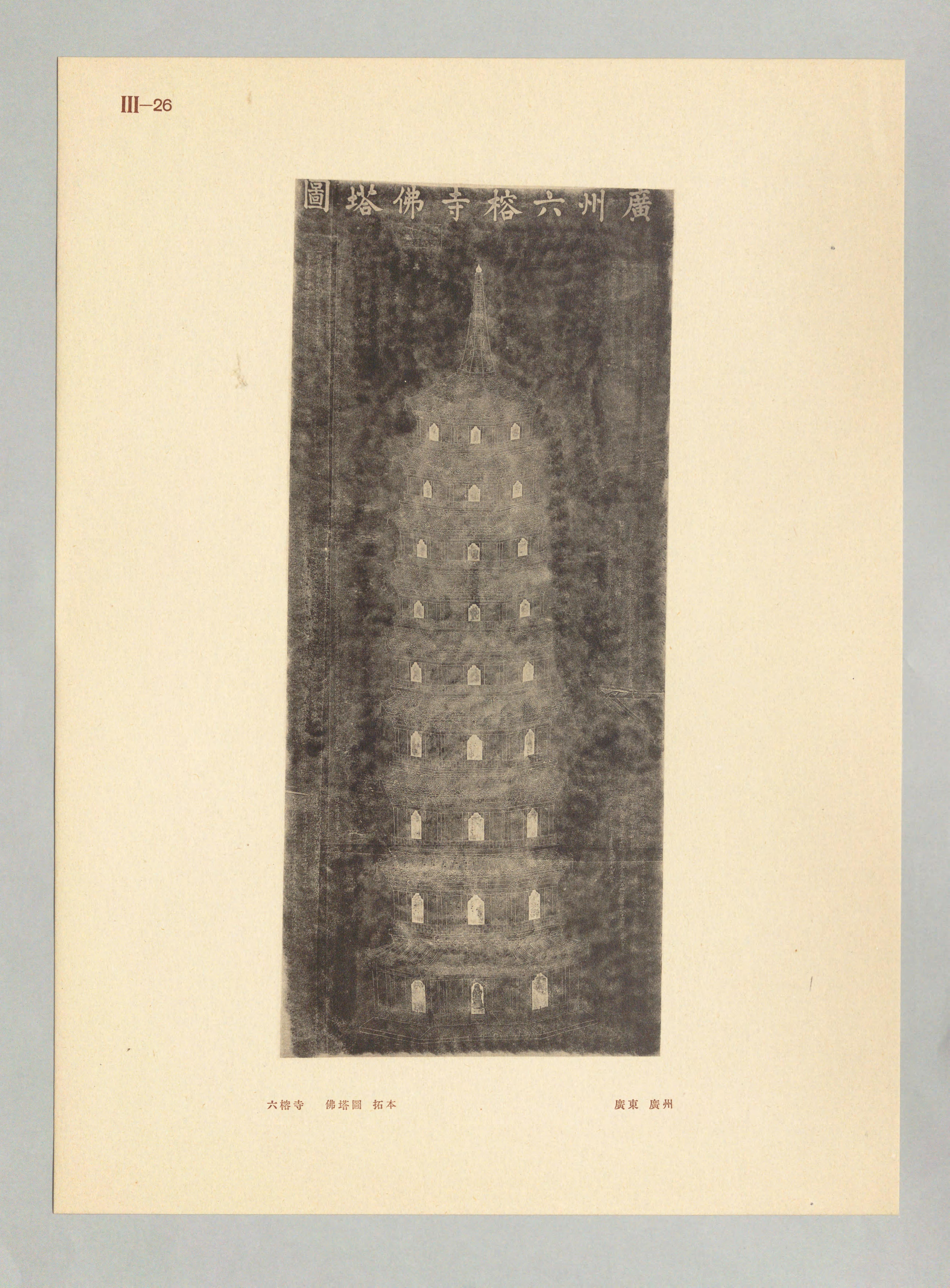 廣州市六榕寺佛塔圖拓本